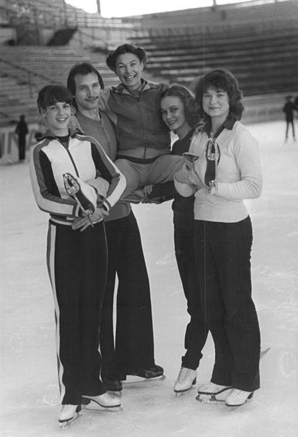 Eiskunstläufer, DDR ADN-ZB Deutsche Demokratische Republik-28.4.1982 Jutta Müller feierte 25jähriges Trainer-Jubiläum. Ihr 25jähriges Trainer-Jubiläum im Eiskunstlaufsport feierte Mitte April 1982 Jutta Müller (M.) aus Karl-Marx-Stadt. Von ihr betreute Sportler eroberten seit 1966 insgesamt 40 Medaillen bei Olympischen Winterspielen sowie Welt- und Europameisterschaften. Das Foto zeigt sie mit vier ihrer erfolgreichsten Schützlinge, die ihr in der Karl-Marx-Städter Eissporthalle gratulierten und sich herzlich bedankten: Olympiasiegerin und Weltmeisterin Anett Pötzsch (r.), Weltmeister Jan Hoffmann, ihre Tochter, Weltmeisterin Gaby Messerschmidt-Seyfert (2.v.r.) und Katarina Witt. Vize-Weltmeisterin und Europameisterschafts-Zweite 1982 (l.). Reporter: Oberst Copyright: ADN-Zentralbild Berlin-DDR Information added by Wikimedia users.retouched version by User:Picandinfo